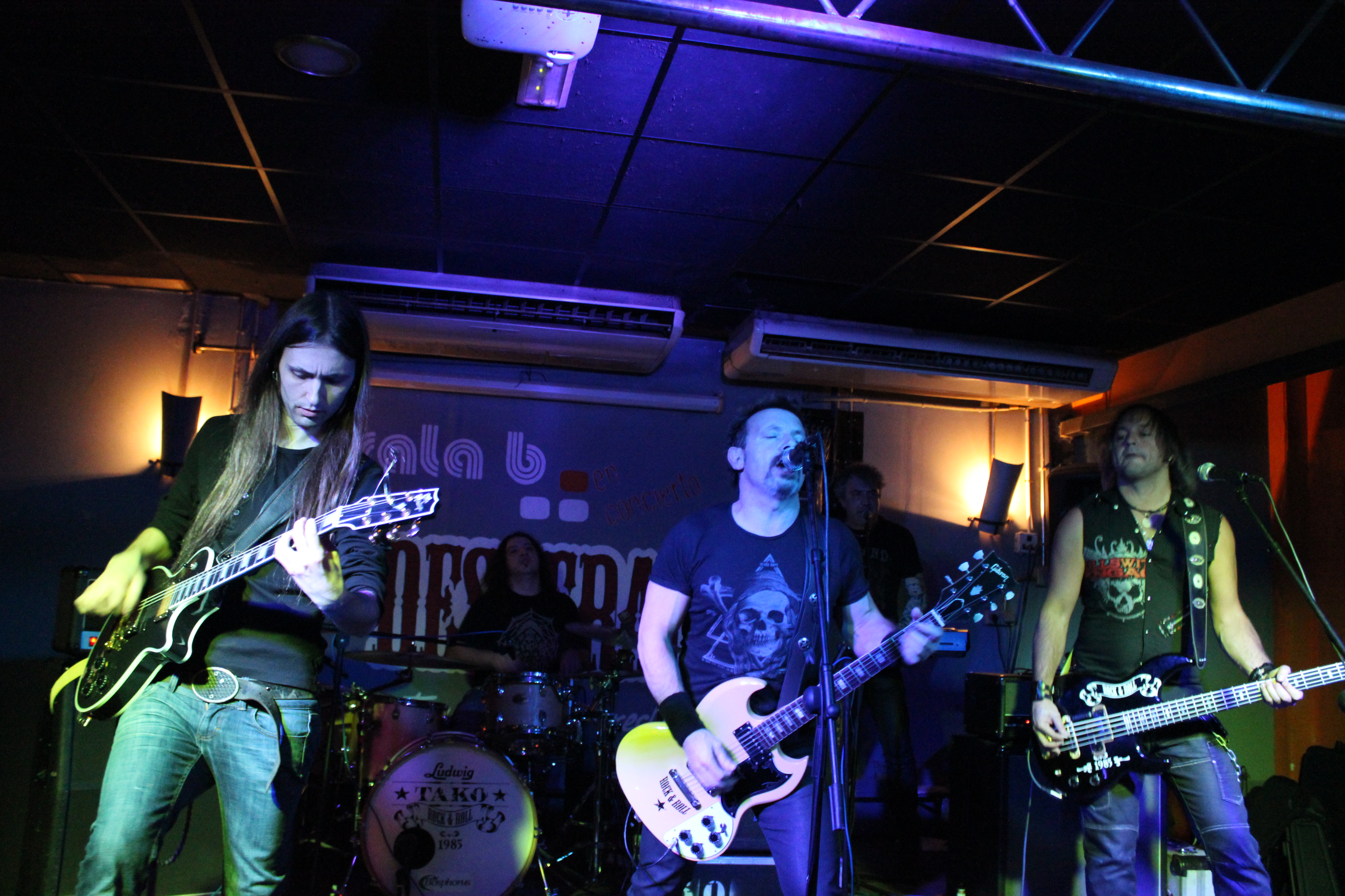 Tako en un concierto en Murcia en 2013